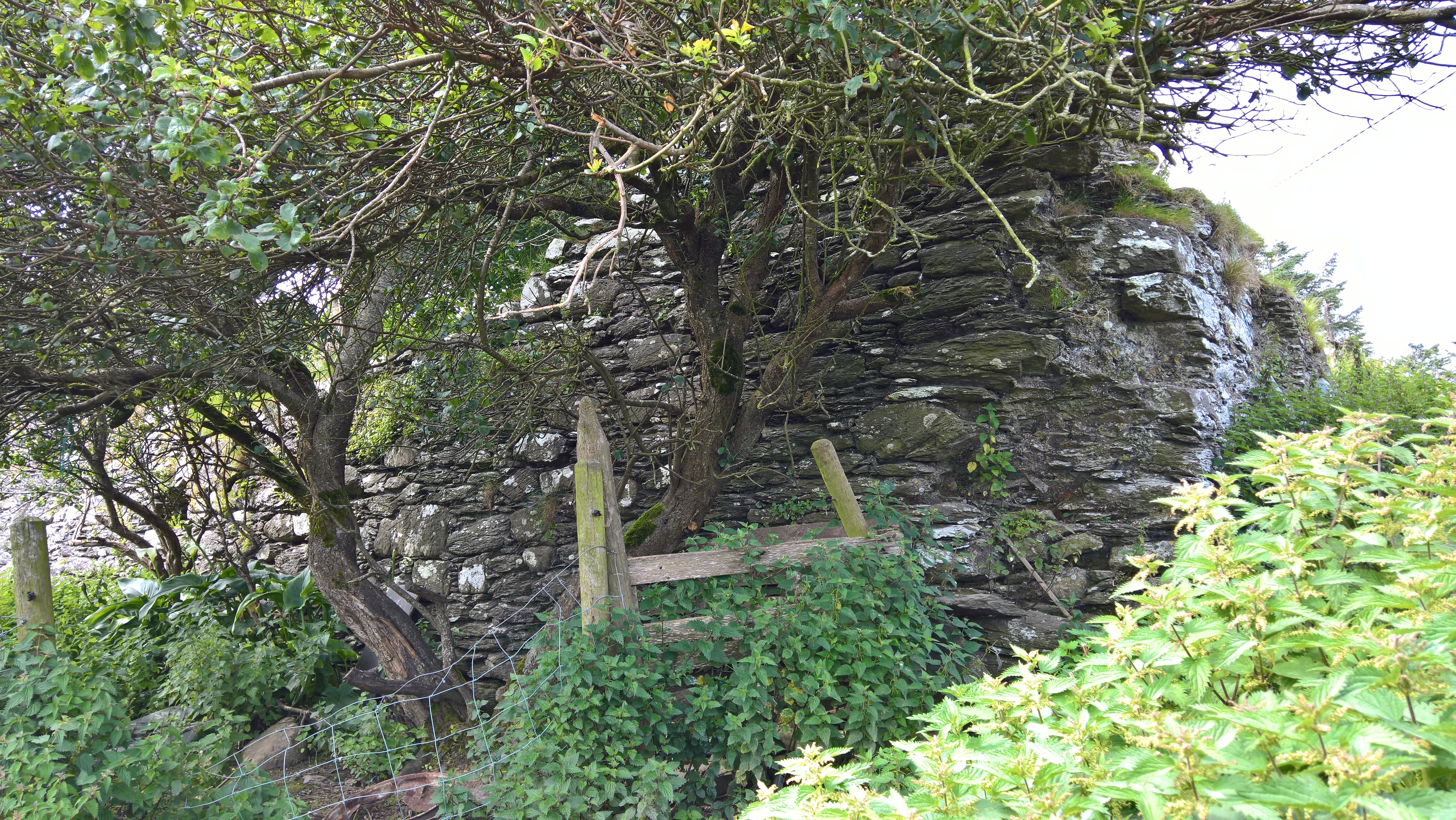 Reste des Fermoyl Castle im Townland Formaoil (TC Trian Iarthach)